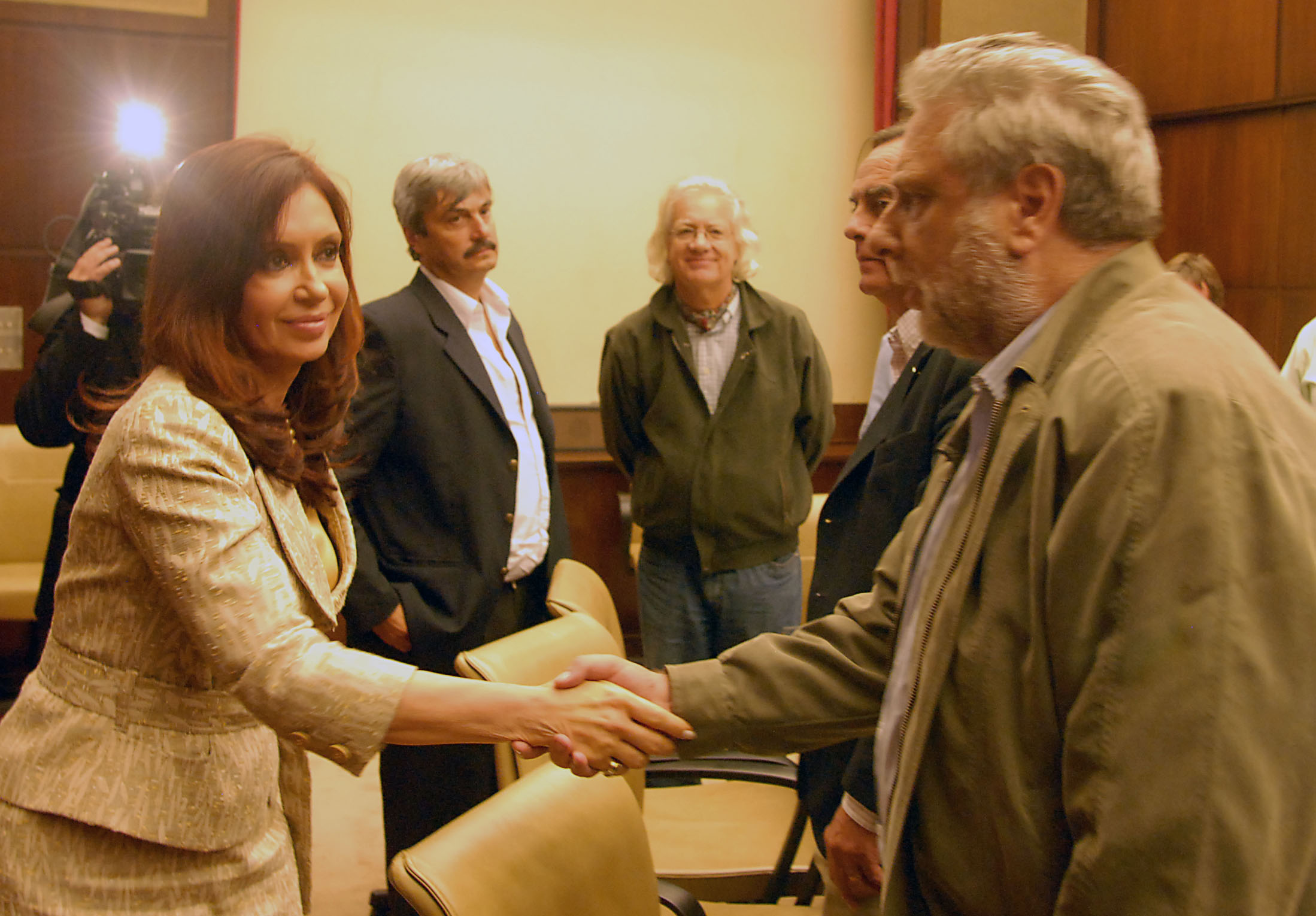 La presidenta de Argentina, Cristina Fernández saludando a los dirigentes de las entidades del campo (Coninagro, Sociedad Rural, CRA y Federación Agraria) que se reunieron con el jefe de Gabinete, Alberto Fernández; el ministro de Economía, Martín Lousteau, y el secretario de Agricultura, Javier de Urquiza.